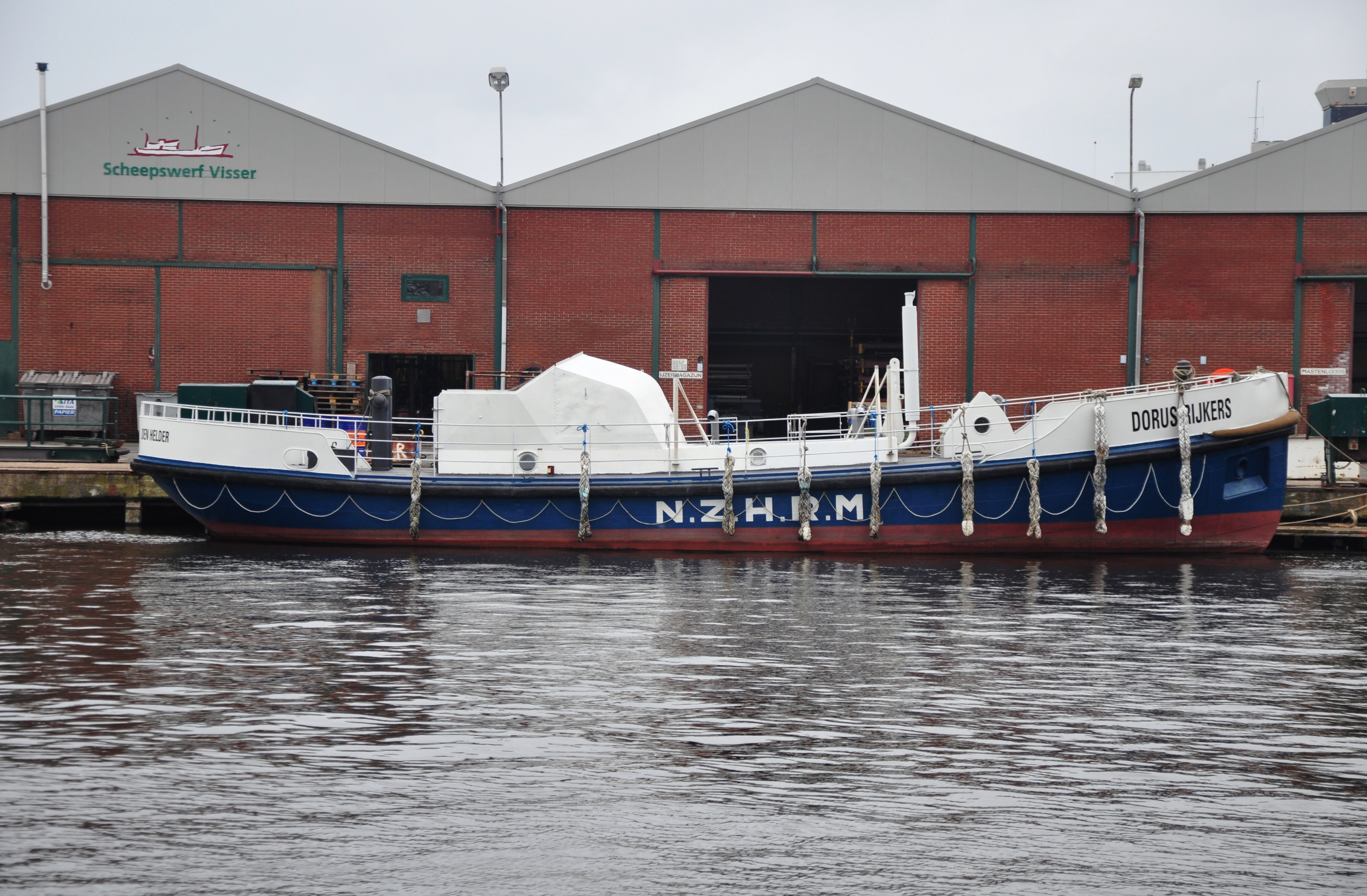 Holland, Den Helder